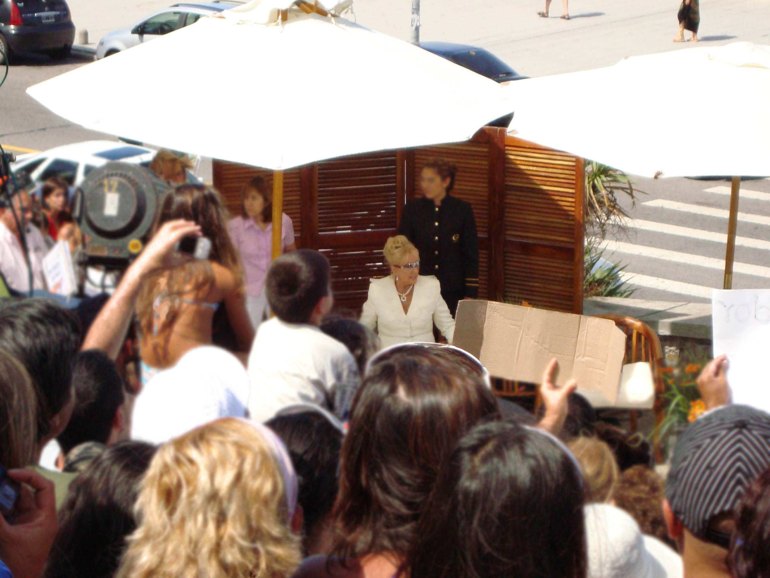 Mirtha Legrand Rodeada de admiradores en la ciudad de Mar del Plata en 2009.